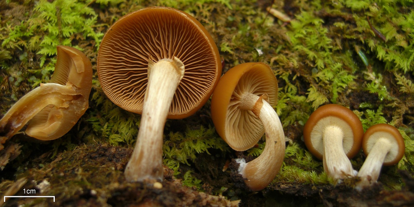 Galerina autumnalis 20091007.14 US, MD, Big Run State Park